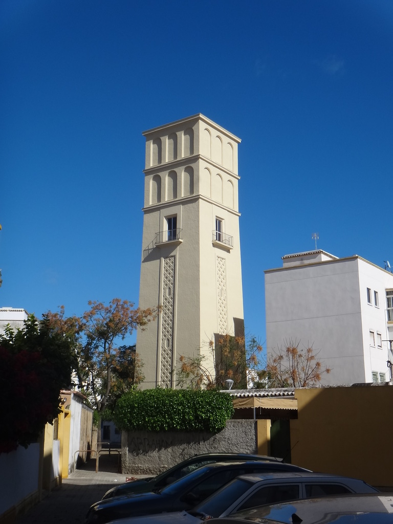 Torre del Agua de Jerez